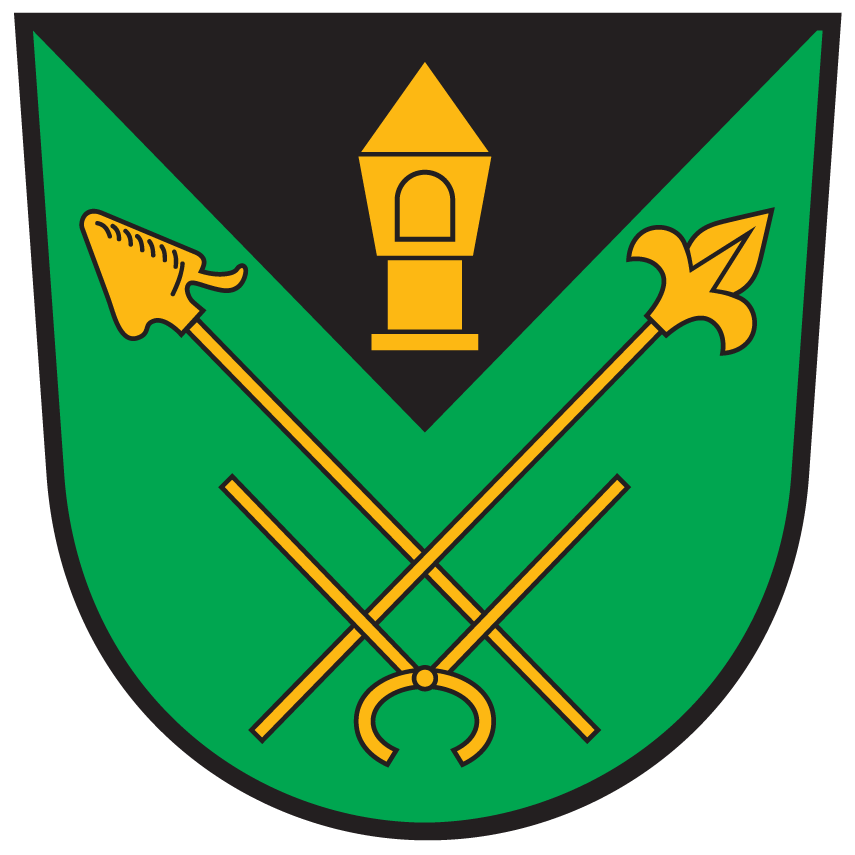 Wappen von Poggersdorf